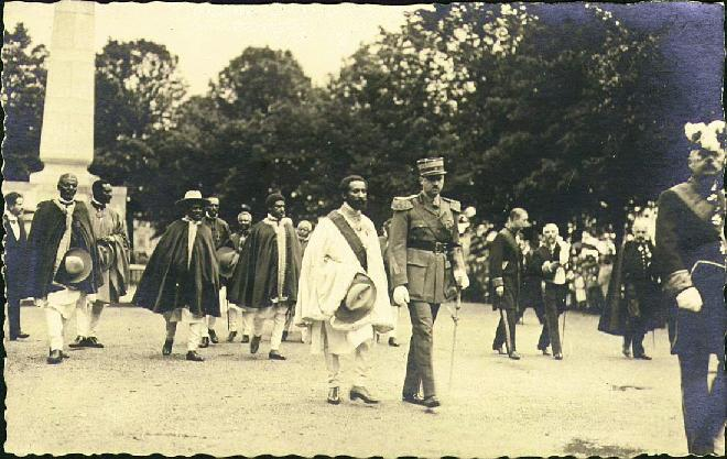 Luxembourg, visite du Ras-Taffari au Monument des Volontaires luxembourgeois de la Grande Guerre (Gëlle Fra) le 25 mai 1924.